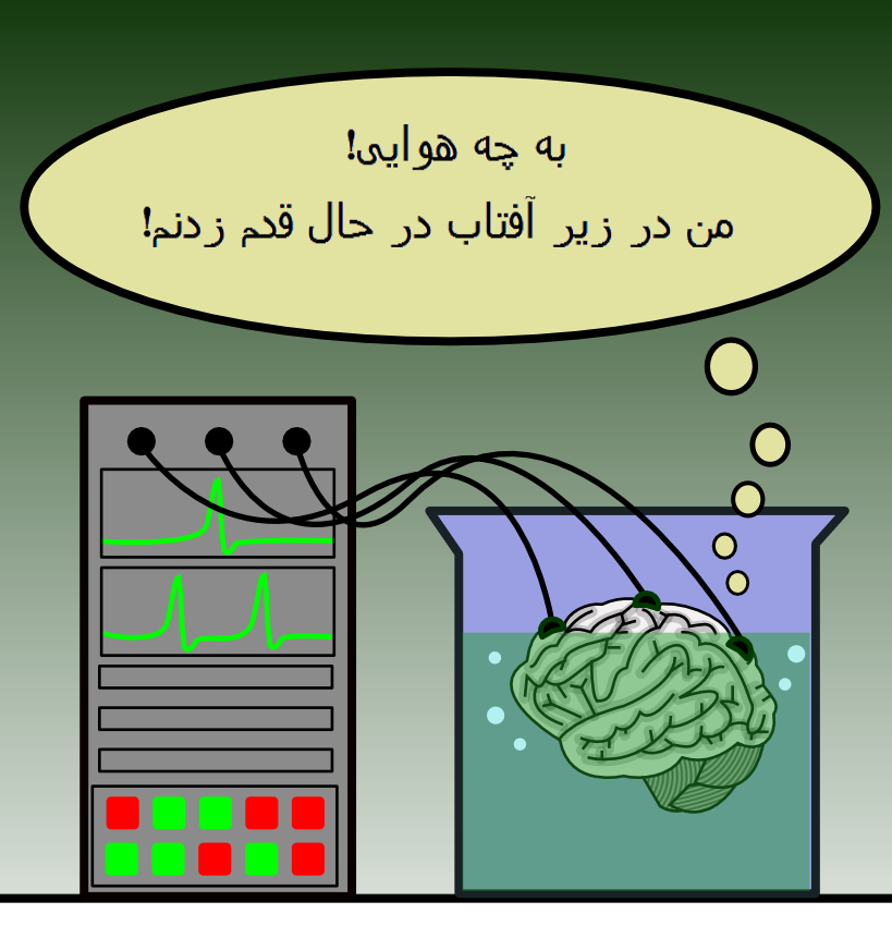 Persian (Farsi) version of Brain in a vat. Famous thought experiment in philosophy of mind